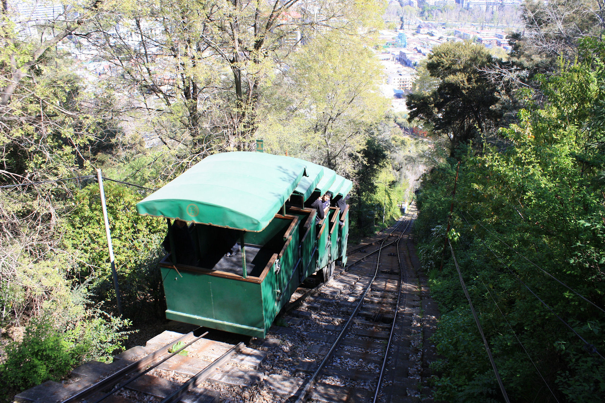 The Cerro Cristabal funicular, Santiago